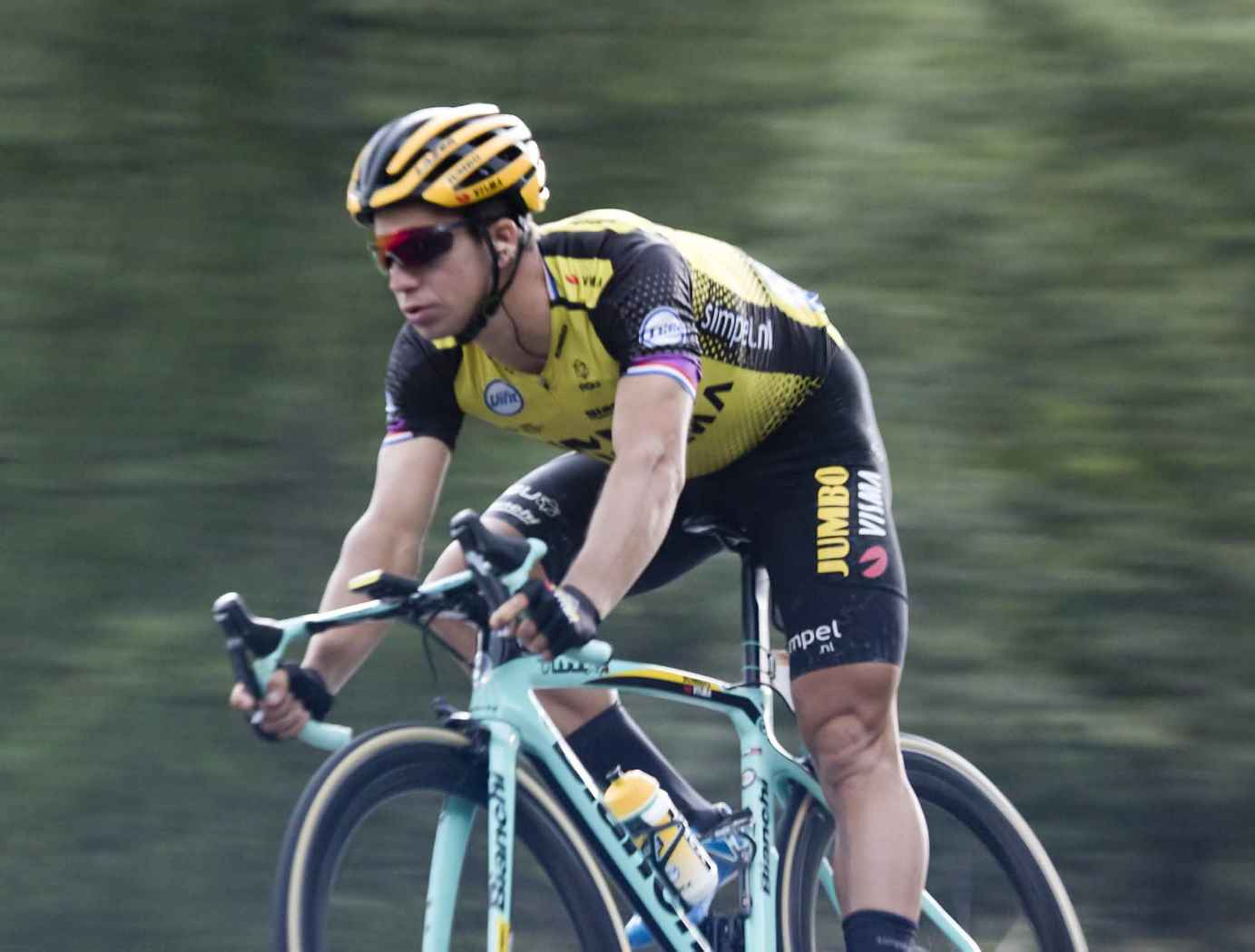 ALP10167 groenewegen